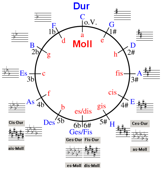 Quintenzirkel